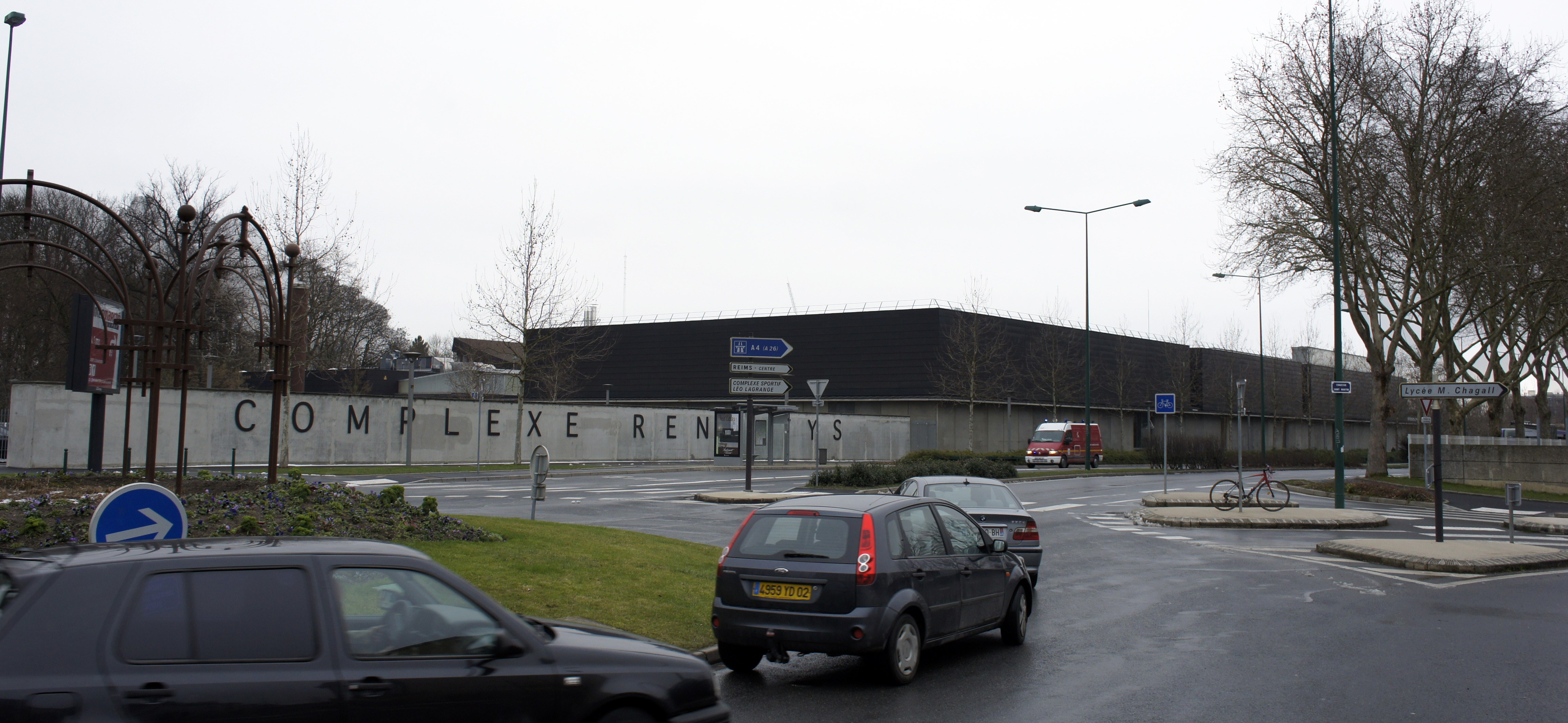 Une vue du sud ouest de René Tys .